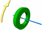 Et af en serie billeder der illustrerer betingelser for beregning af inertimoment